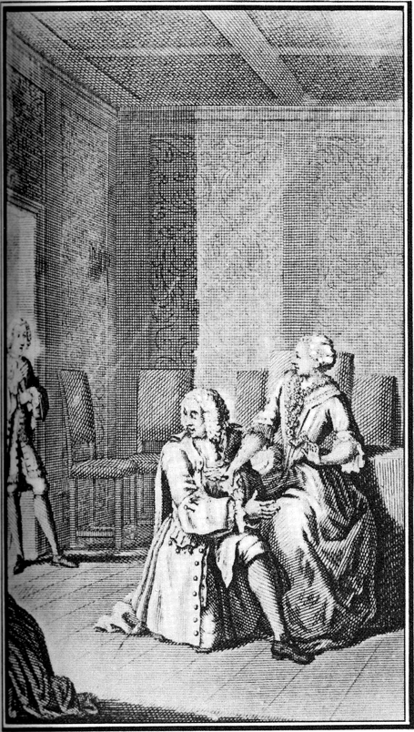 La Vie de Marianne by Pierre de Marivaux (1688-1763)